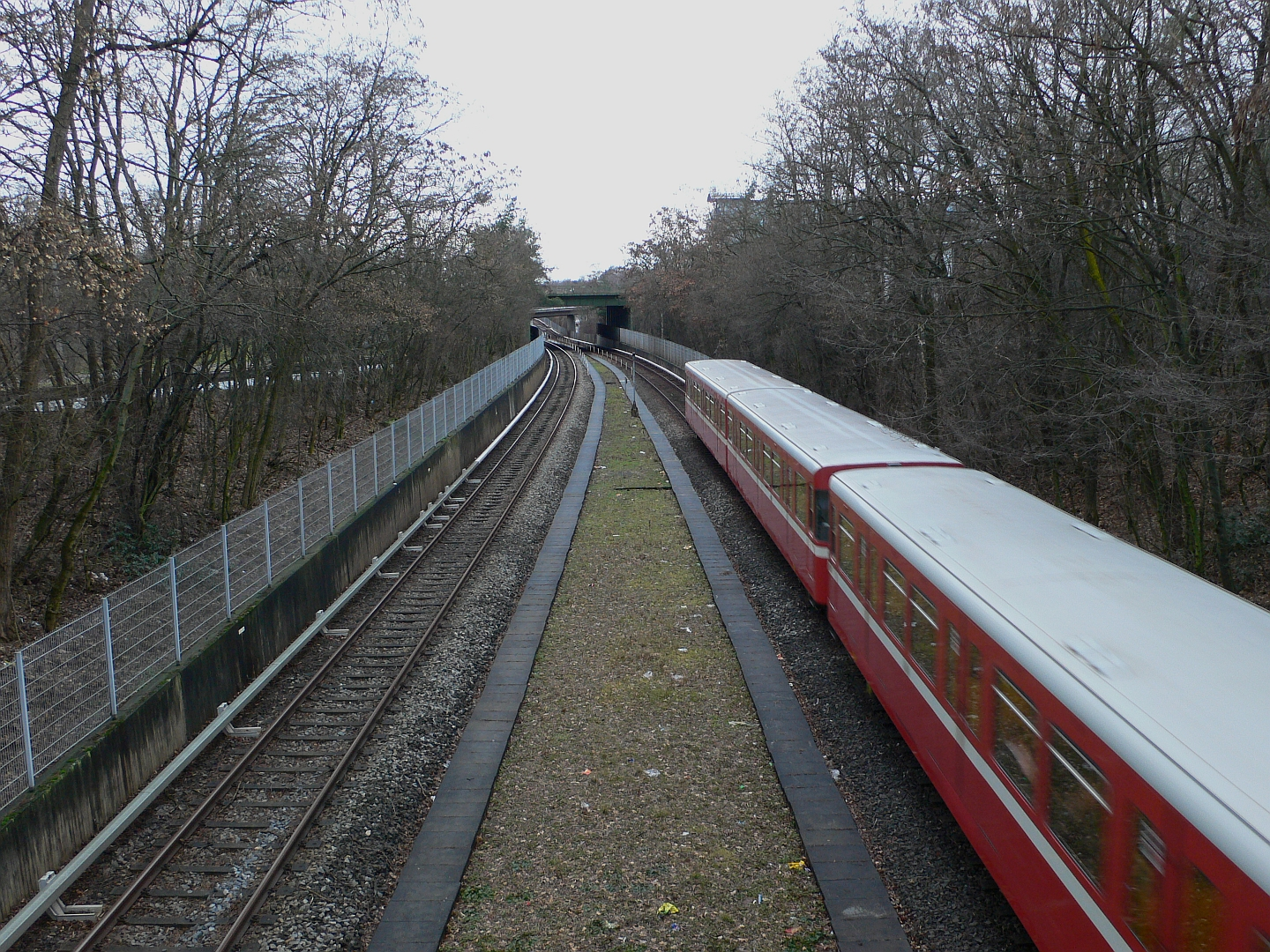 U-Bahn Nürnberg, Streckenabschnitt Langwasser Mitte–Scharfreiterring mit DT1 Richtung Fürth